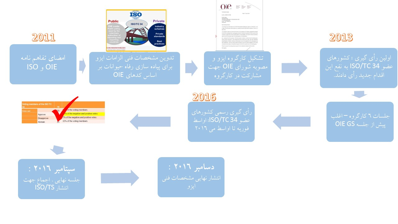 فرآیند تدوین استاندارد رفاه حیوانات